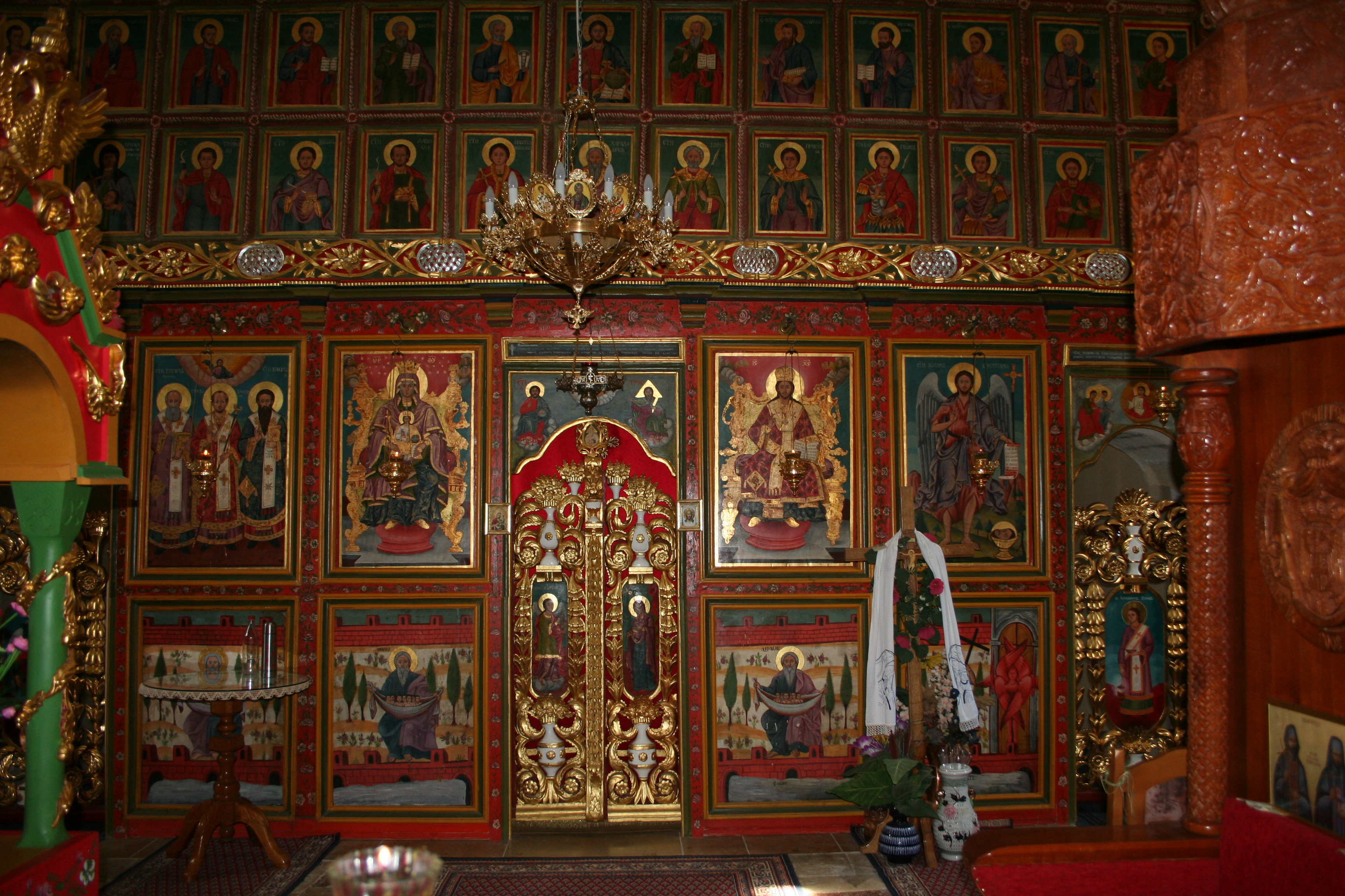 Manastir Čokešina